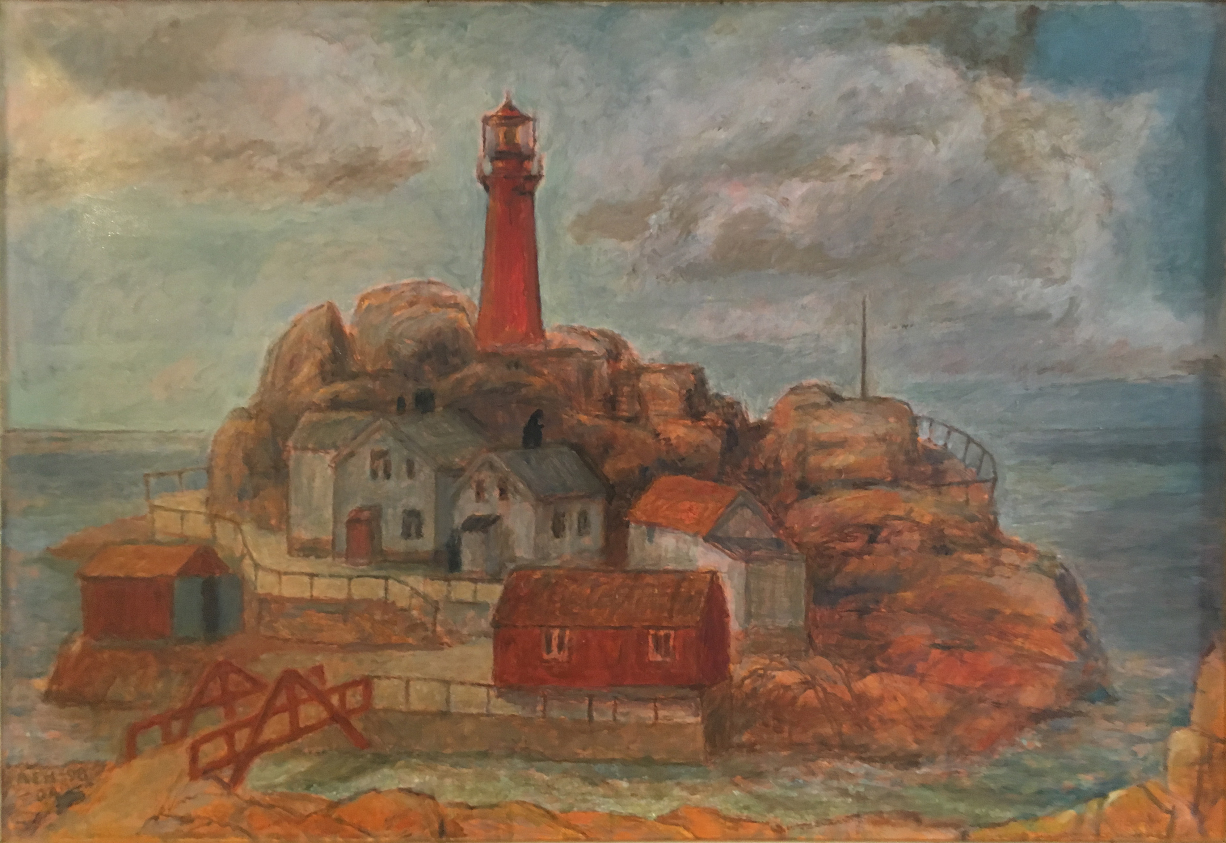 Maleri av Arne E. Holm. Olje på lerret. Ukjent tittel